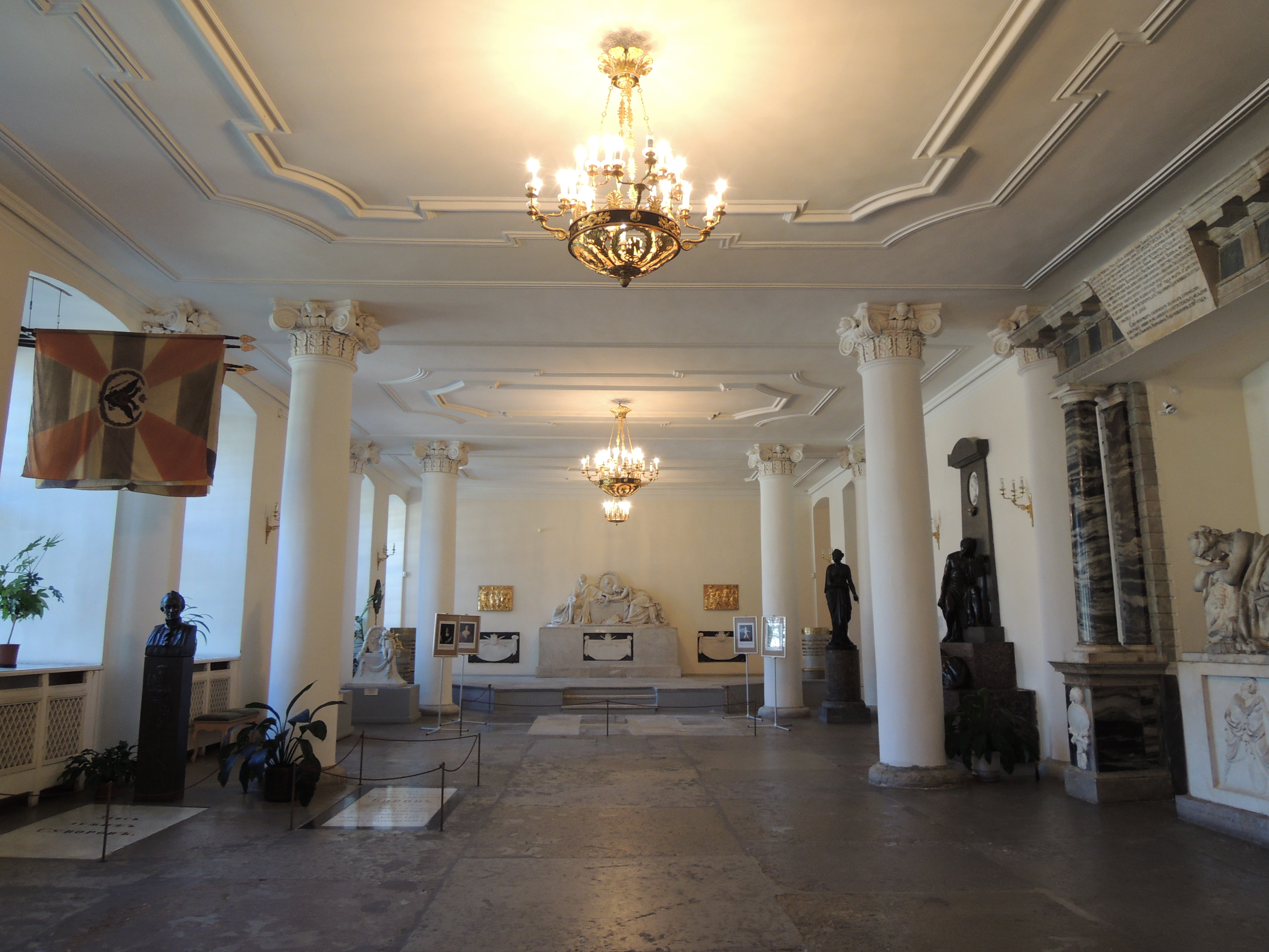 Благовещенская церковь Александро-Невской лавры